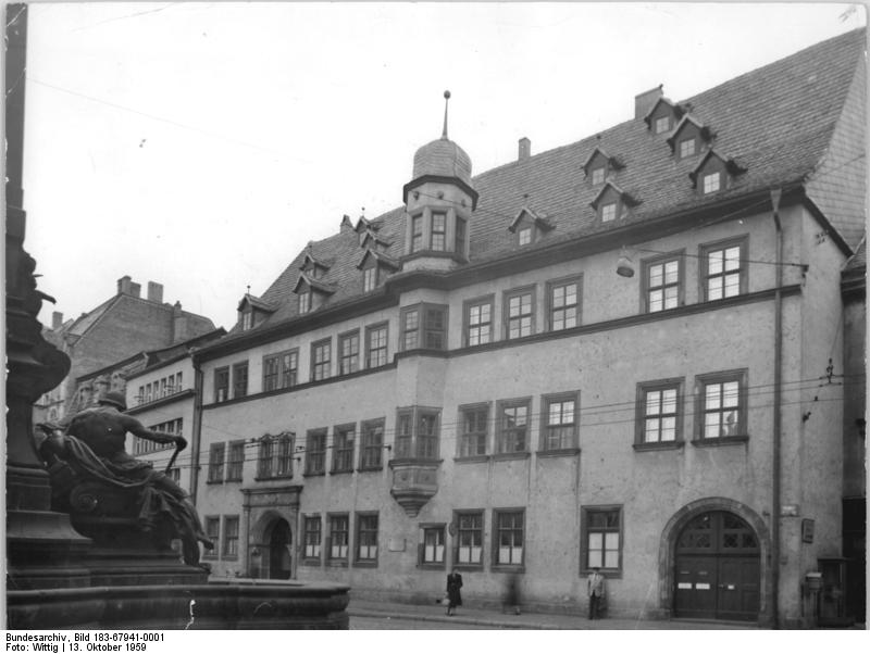 Erfurt, Luciushaus Zentralbild Wittig 13.10.1959 Nl-Noa. Zum 200. Geburtstag von Friedrich von Schiller am 10. November 1959. Schiller- und Goethe-Gedenkstätten in Erfurt. Das Luciushaus am Angerbrunnen in Erfurt, in dem Goethe und Schiller aus- und eingingen und in dem Wilhelm von Humboldt 1791 Caroline von Lacheröden heiratete. UBz: Blick auf das Luciushaus in Erfurt. Information added by Wikimedia users. = Haus Dacheröden, am Anger in Erfurt